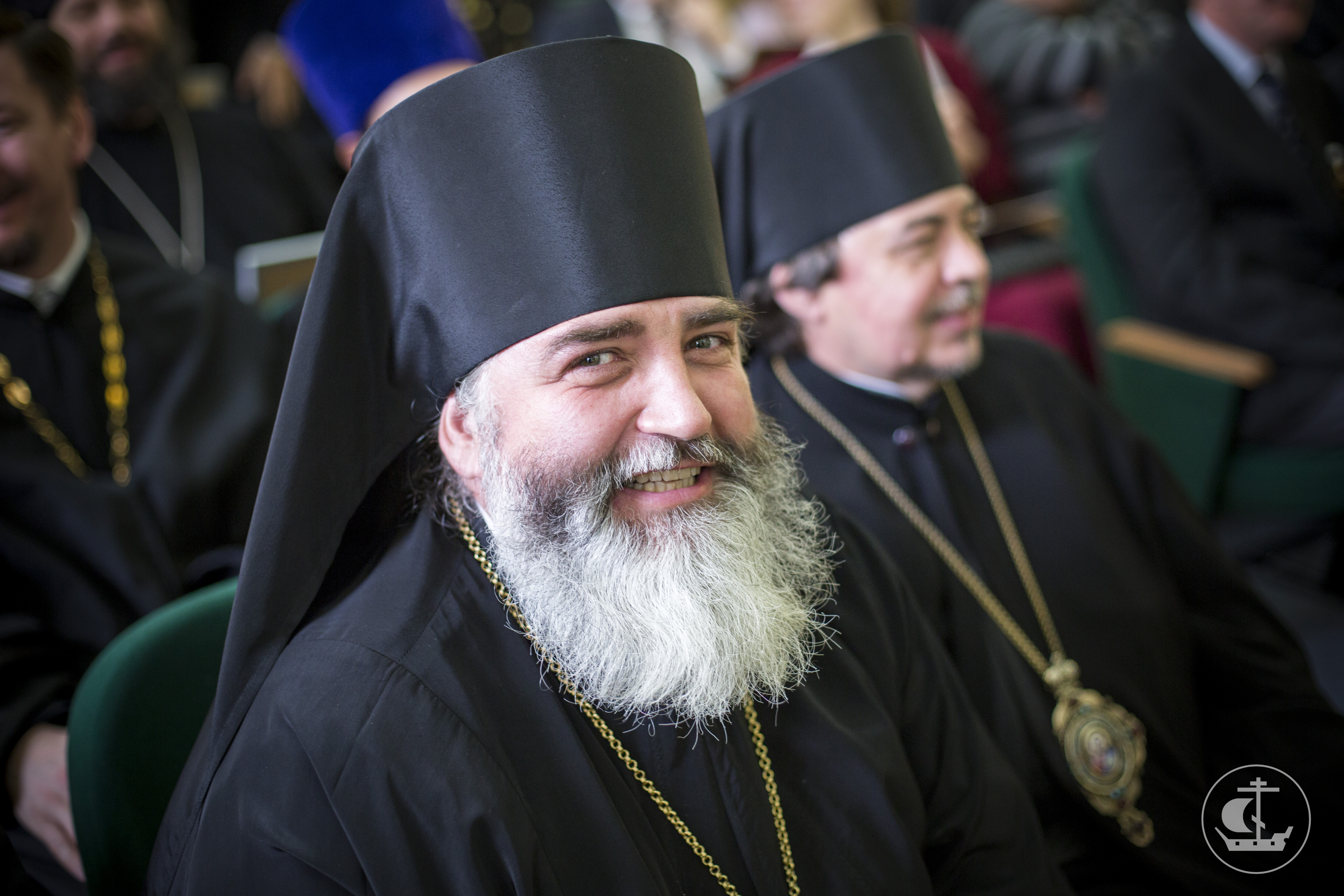 9 октября, Годичный акт 2013